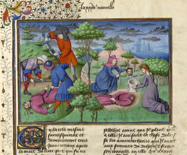 Quarta giornata, quinta novella: “I fratelli di Lisabetta ne uccidono l’amato. Staccata la testa dal corpo, la cela in un vaso. Glielo tolgono e muore di dolore”. Miniatura tratta dal ‘Decameron’ (codice del XV secolo), Bibliothèque de l’Arsenal, ms. 5070 réserve, fol. 162r